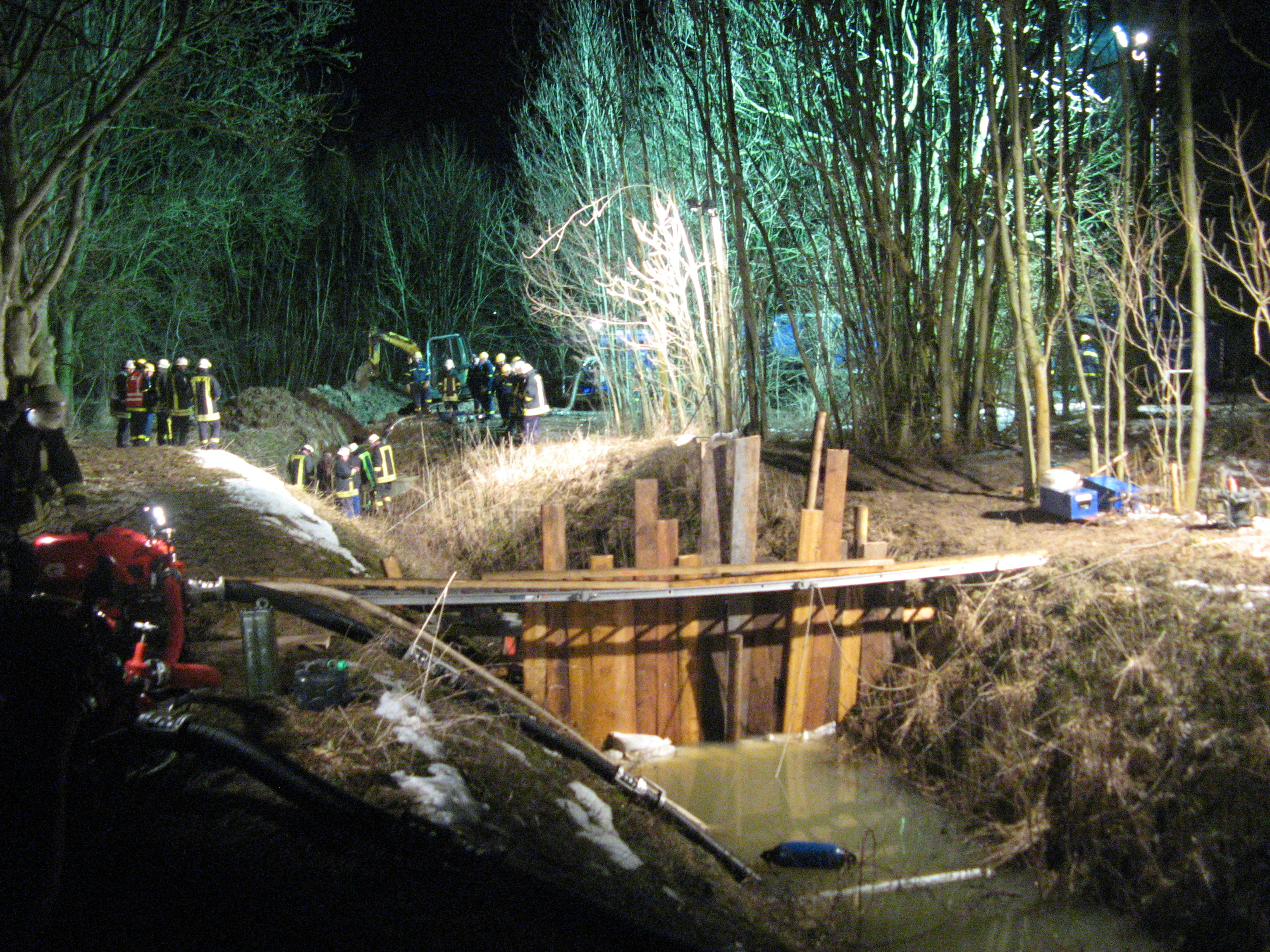 Spundwand aus Holz im Einsatz in Meddewade aus Blickrichtung Oberstrom